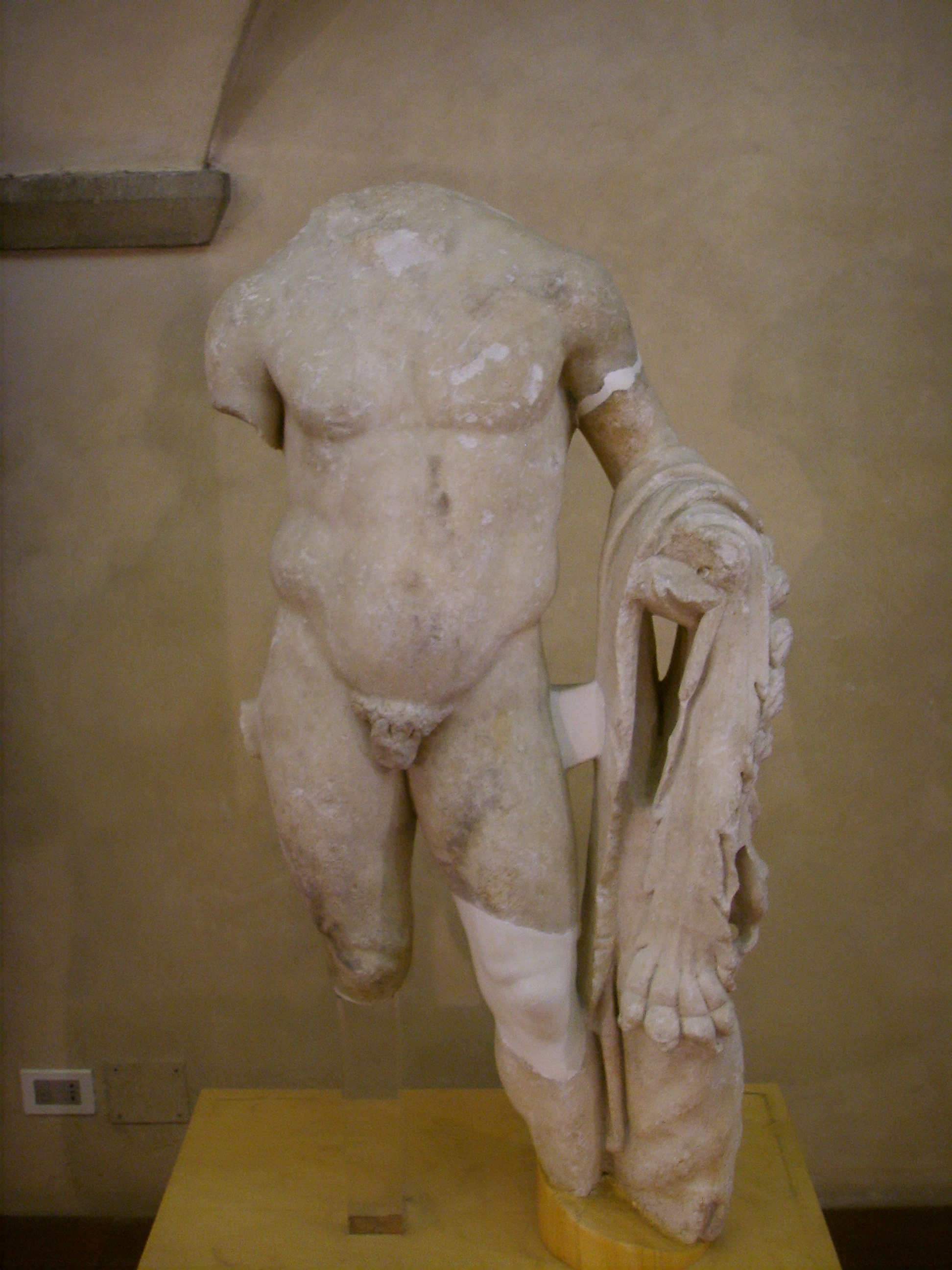 Museo Firenze com'era, archaeological room, in Florence, italy